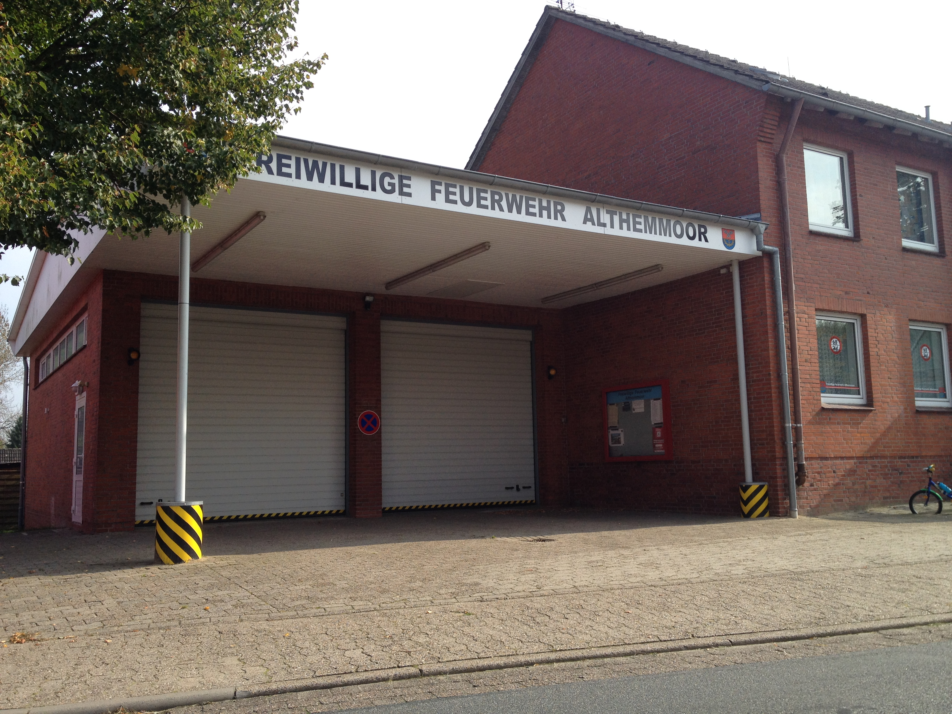 Sprüttenhuus in Ooldhemmoor